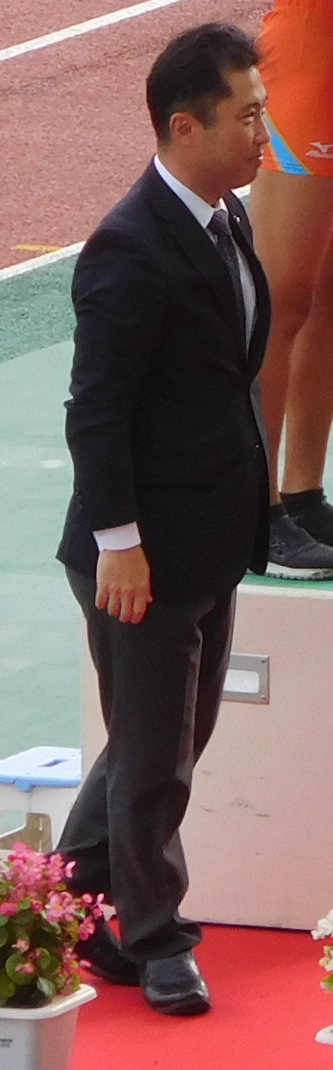 第74回国民体育大会陸上競技にて表彰式に臨む、ひたちなか市長・大谷明。